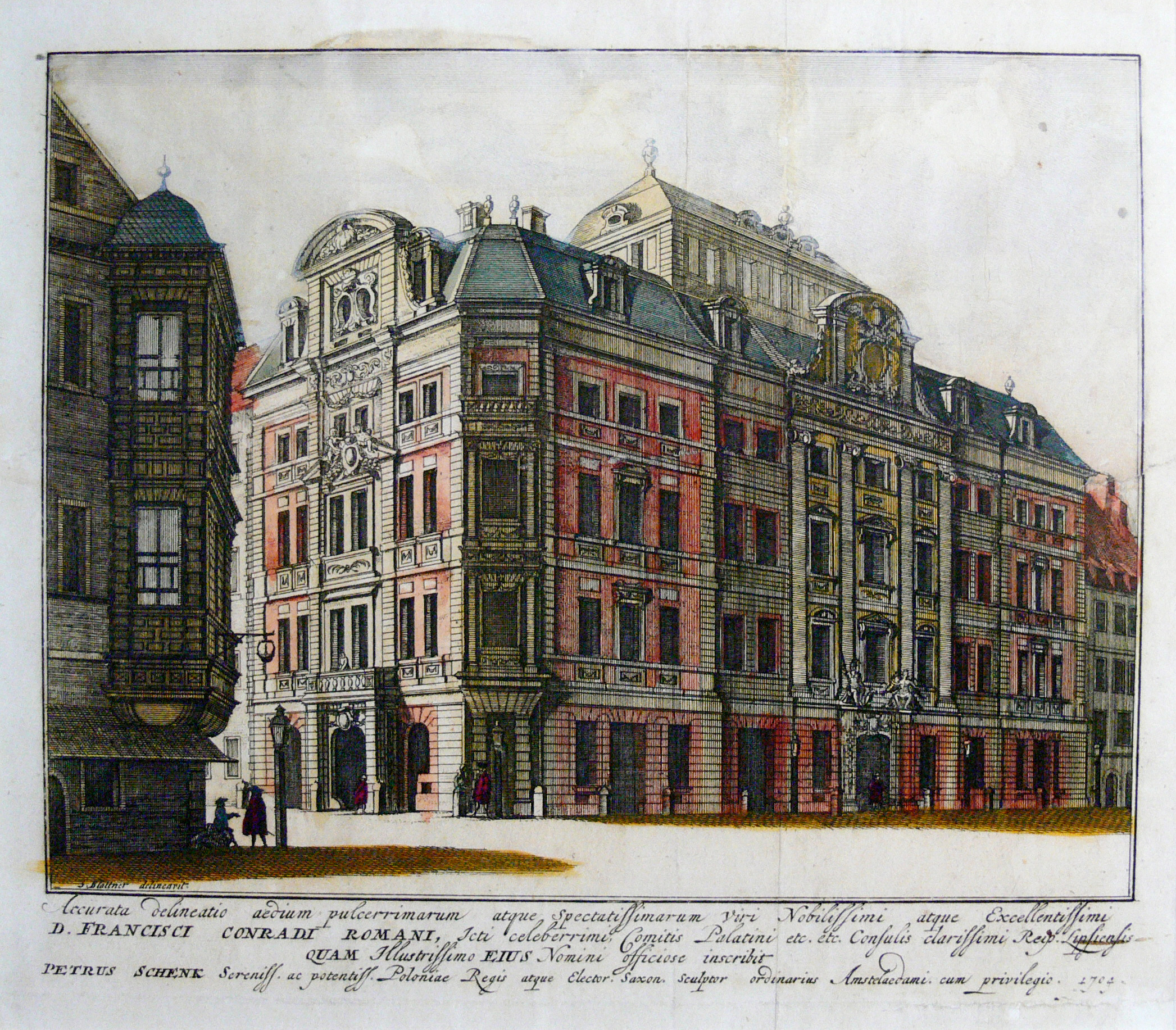 Das Romanunshaus in Leipzig, Kupferstich 1704 von Peter Schenk (1660 - 1718) nach einer Vorlage (Zeichnung? Vedute?) von Samuel Blättner (1674 - 1706). Der Weinhändler G. W. Richter erwarb das Haus 1770 von der Witwe des Erbauers und richtete im zweiten Obergeschoss ein Café vornehmen Stils ein. 1785 konnte Schiller dort die Bekanntschaft nahmhafter Literaten, Künstler und Verleger machen (Starke, Werner: Romanushaus. Leipzig: VEB Seemann 1976).